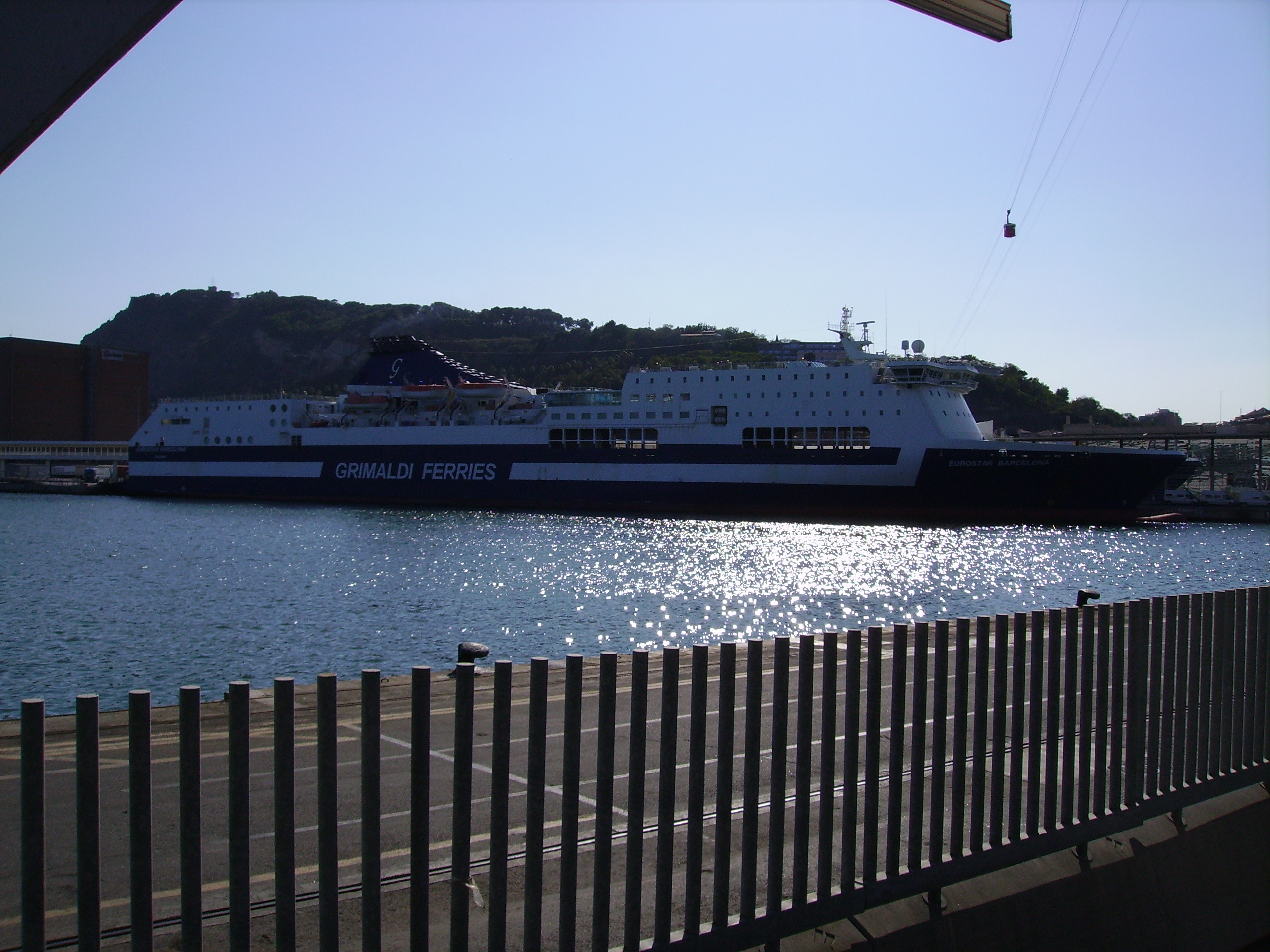 Eurostar Barcelona, Grimaldi Ferries (Port de Barcelona).